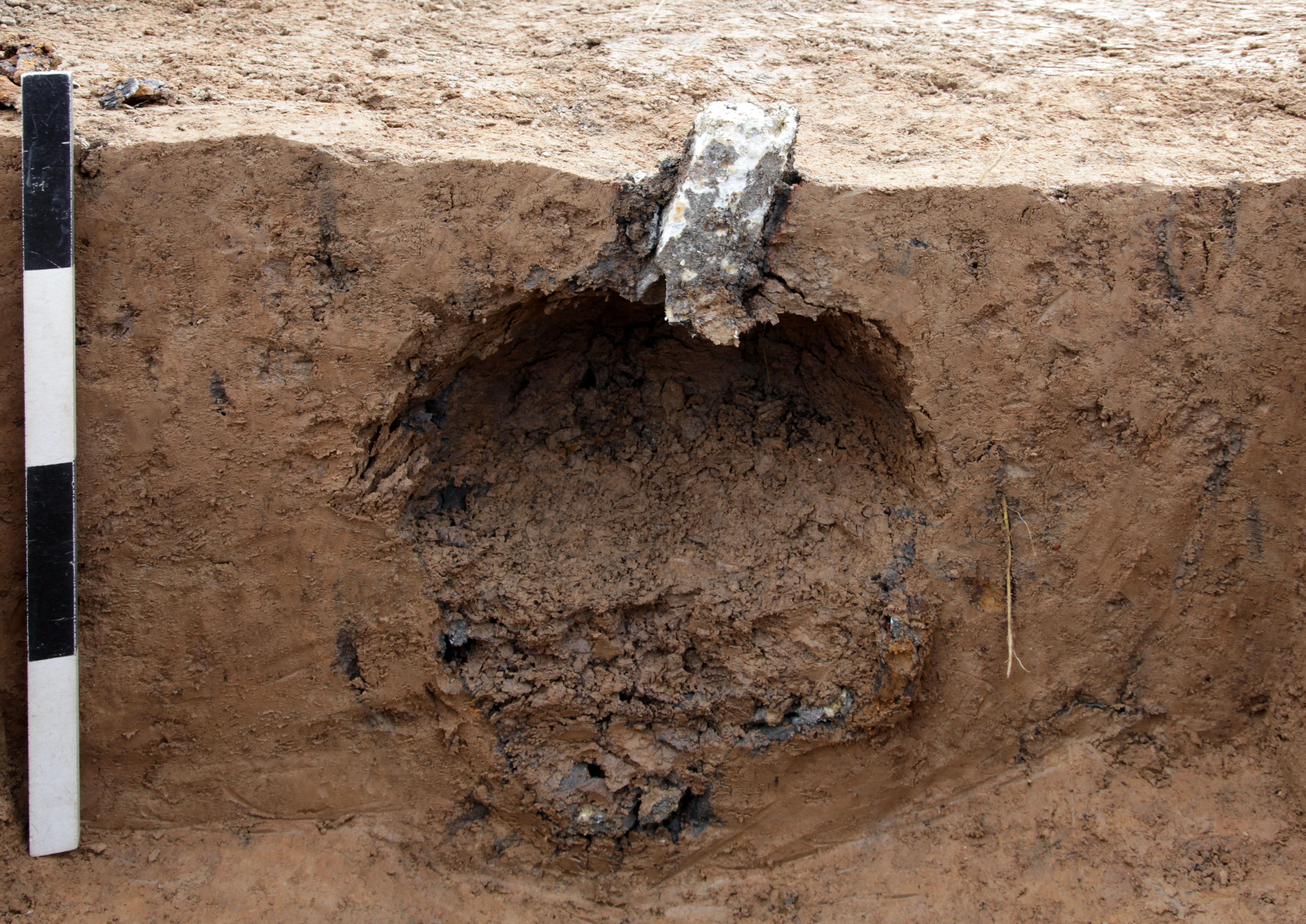 ausgebrannte und detonierte Stabbrandbombe, 60 cm tief in Lehm, Dresden-Gruna, Germany